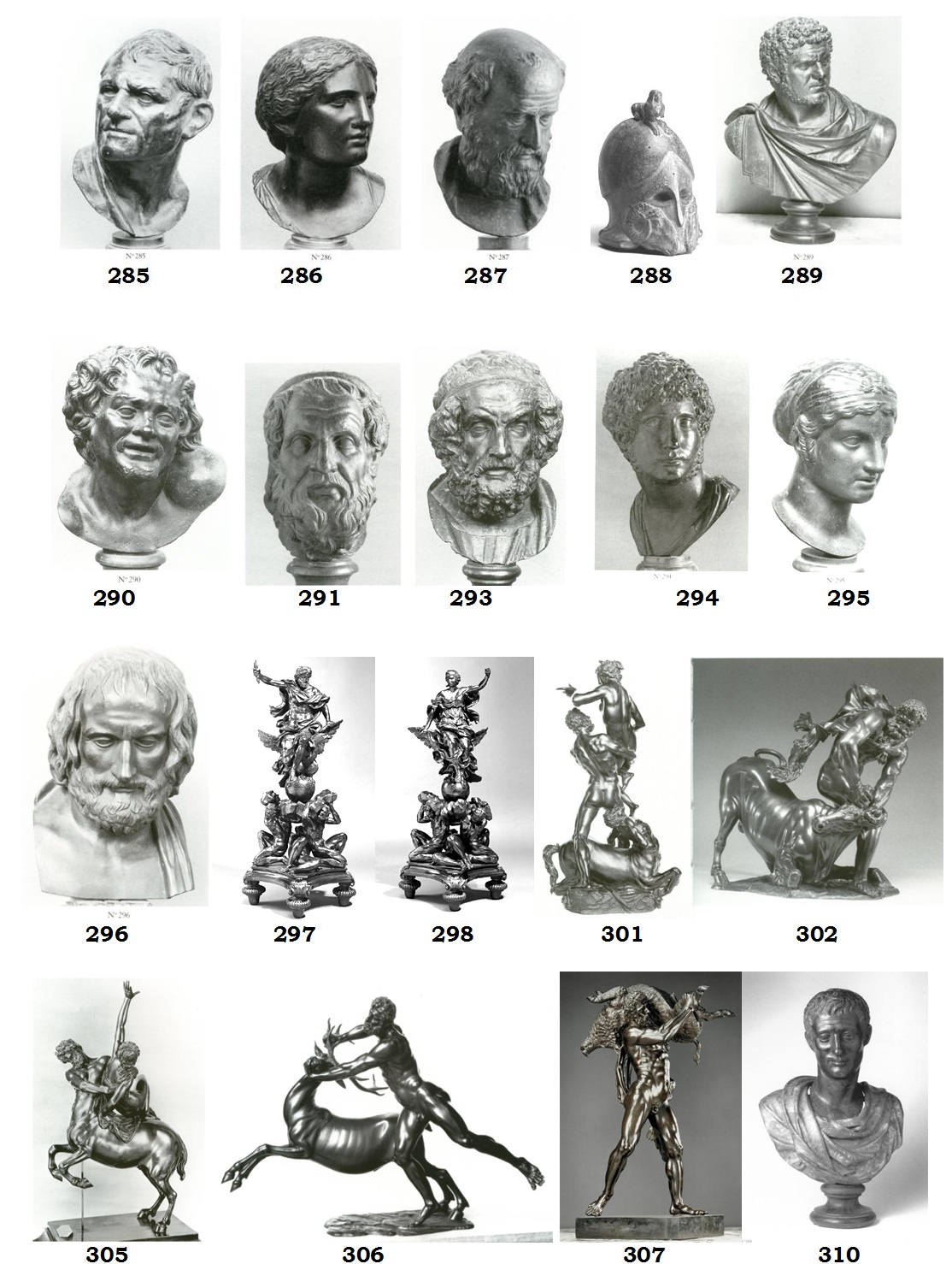 Les bronzes de la Couronne placés dans la Galerie de Meudon. Avec leur numéro d'inventaire.